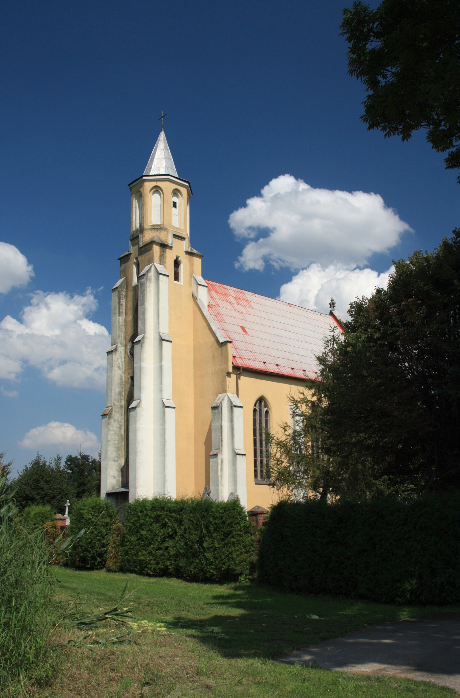 Kostel svatého Ondřeje, Slezské Pavlovice.